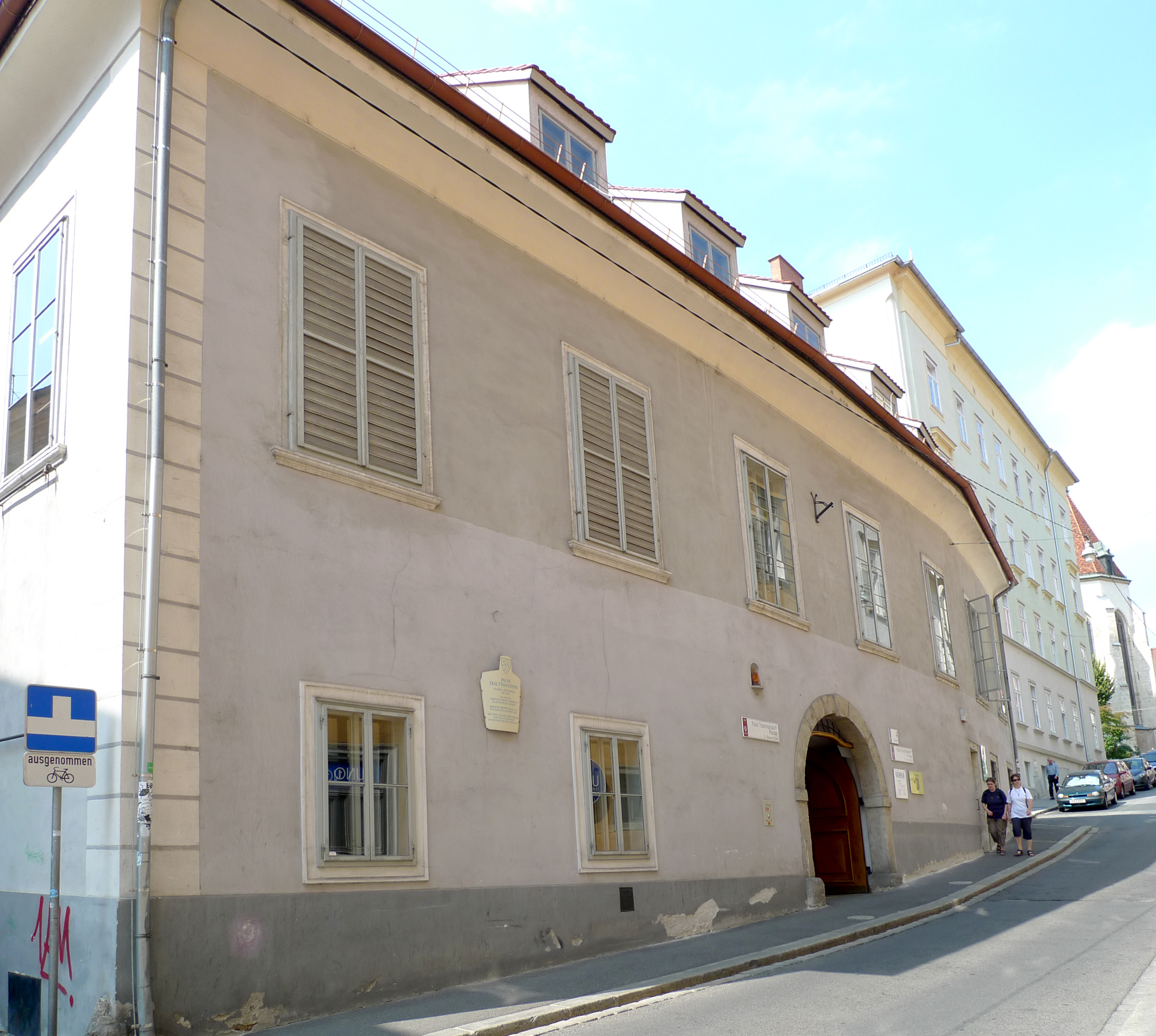 Ehem. Palais Trauttmansdorff